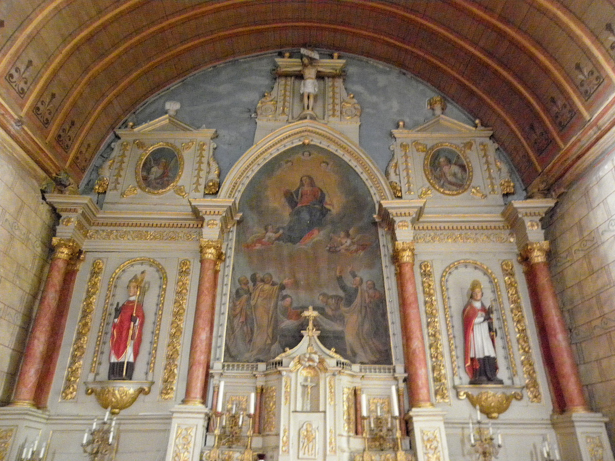 Église Notre-Dame de Rimou (35). Intérieur. Maître-autel et son retable. Le retable.